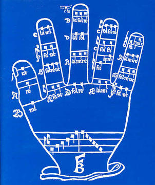 Mano de Guido de Arezzo para la solmización